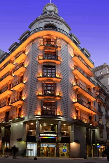 Banco Credicoop, Filial Centro. Lavalle 406 (esq. Reconquista), Buenos Aires.